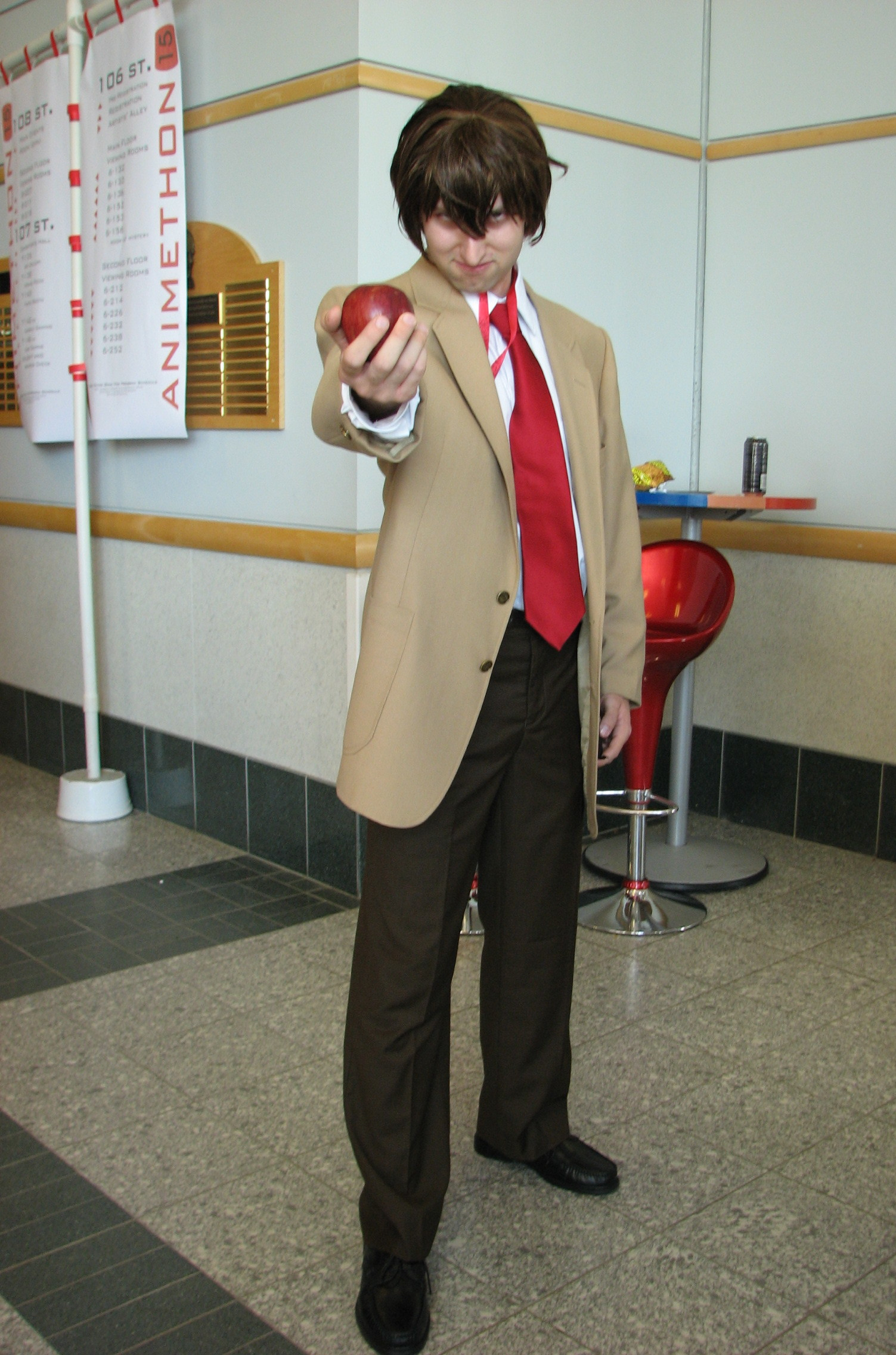 Animethon XV，《死亡筆記本》夜神月cosplayer。